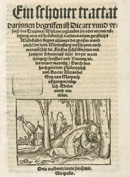 Titelblatt des Traumtraktats